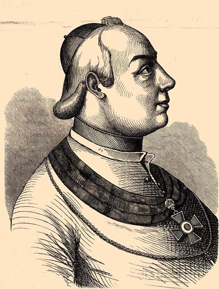 Mártonffy József jezsuita szerzetes, erdélyi katolikus püspök.